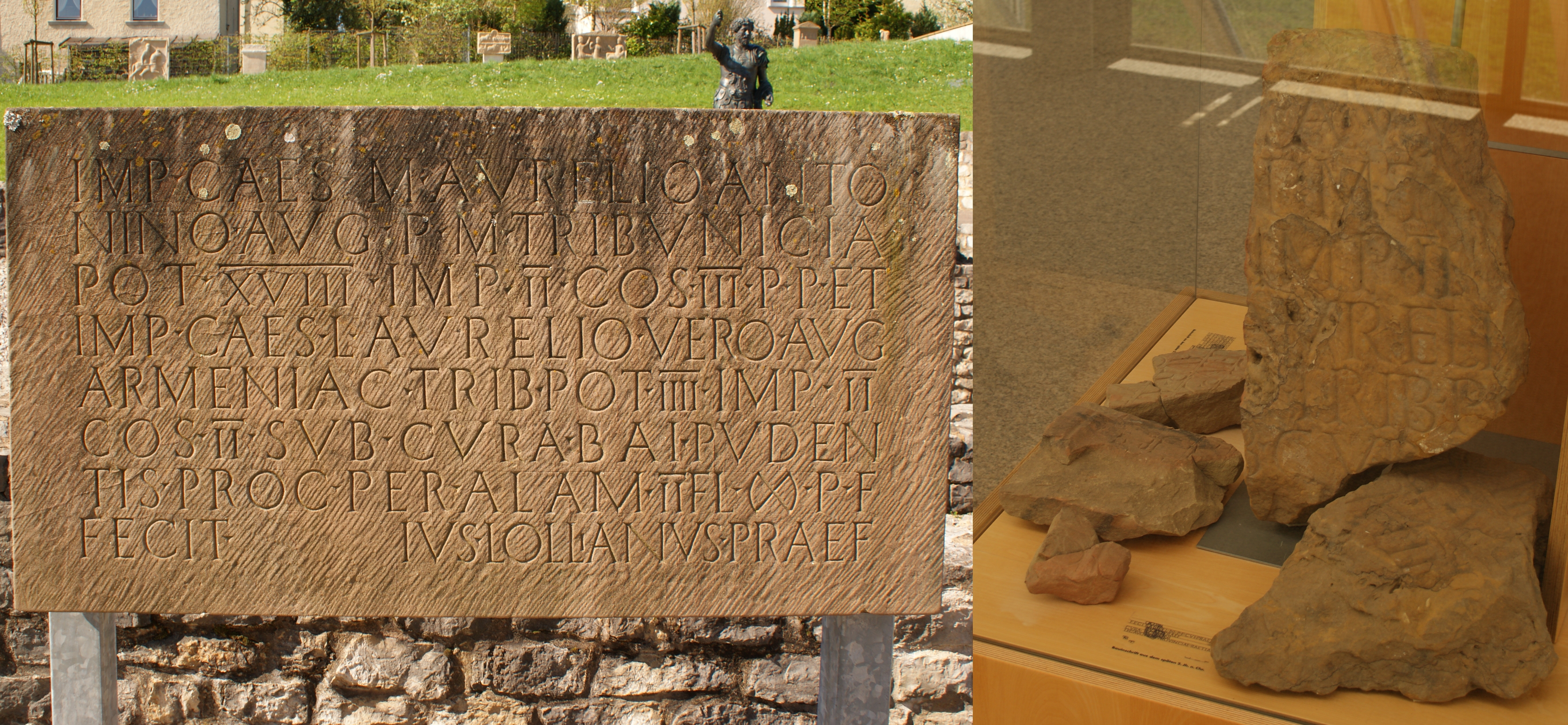 Limesmuseum Aalen, Bauinschrift vom Aalener Kastell (AE 1986, 00528 = AE 1989, 00579 = AE 1995, +00045), links Nachbildung in der Außenanlage, rechts Bruchstücke der Inschrift im Museum. Mit freundl. Genehmigung des Museums.